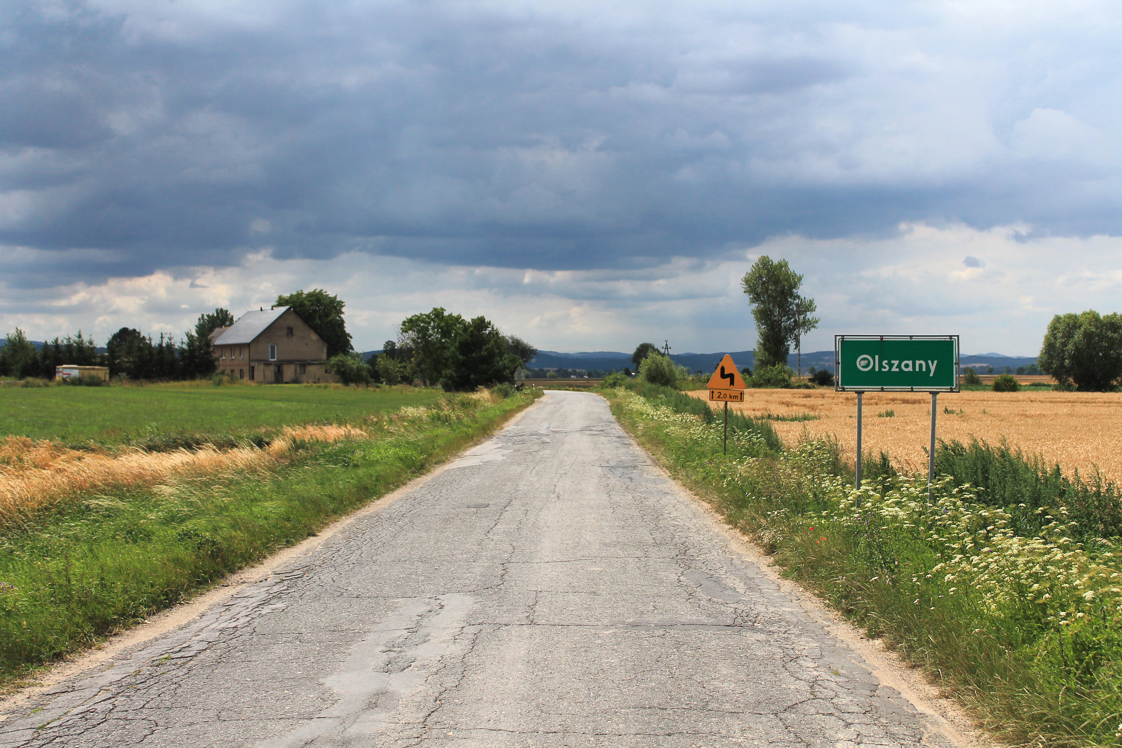 Olszany, gmina Strzegom. Wjazd do miejscowości od strony Stanowic.